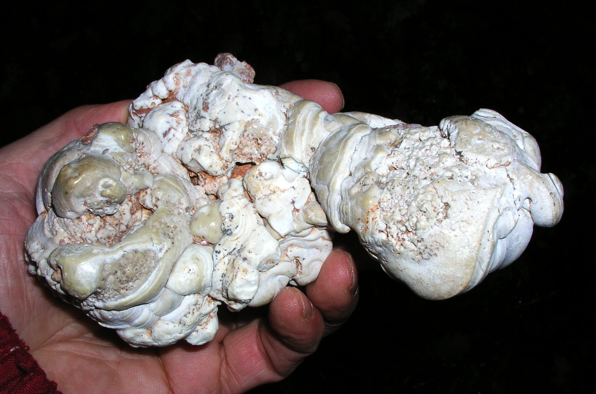 Nodule provenant des gisements de phosphates du Quercy (de -50 à -20 millions d'années), France.